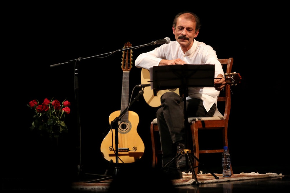 کنسرت موسیقی سهیل نفیسی، ۲۷ اردیبهشت ۱۳۹۶ در تالار وحدت